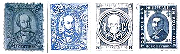 Пропагандистские марки монархистов Франции, 1871, 1874 и 1908 годов.